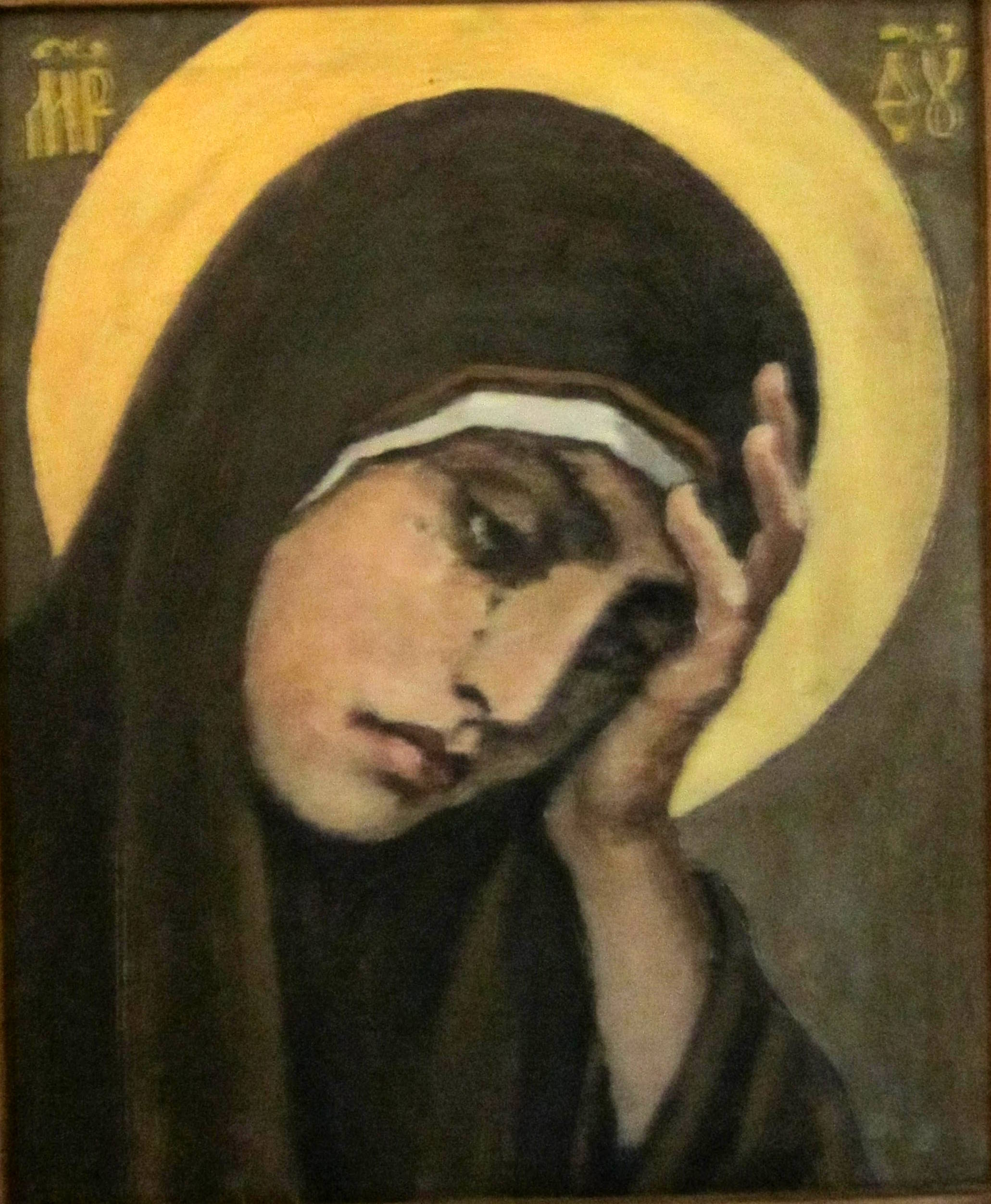 Копия иконы украинского художника Г.И. Бельцова. Создана в 80-е годы в Одессе.